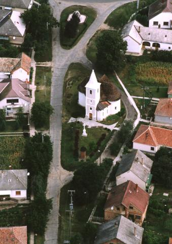 Rábaszentmiklós, Hungary, aerialphotography